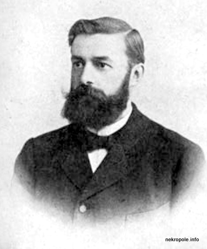 Porträt von Pastor Hans Bielenstein